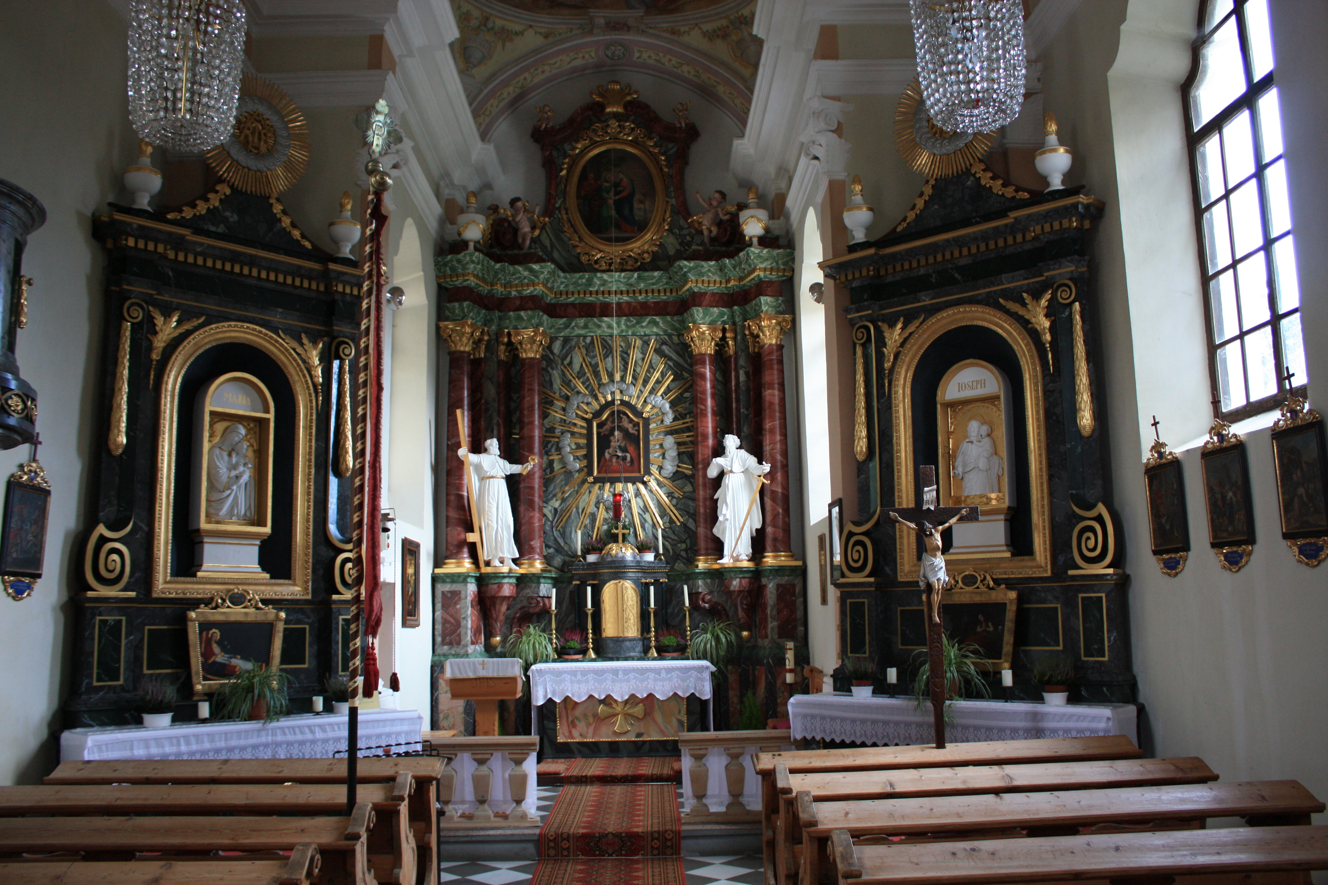 Kath. Filialkirche Maria-Heimsuchung